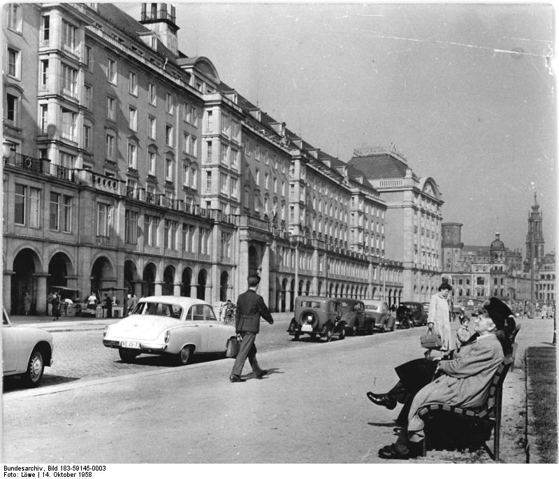 Dresden, "Alter Markt", Neubauten Zentralbild Löwe 14.10.1958 Vgt-Noa. Wiederaufbau der Elbestadt Dresden. Während in den Jahren 1956 57 im Bezirk Dresden 10500 Wohnungen gebaut wurden, werden es 1958 59 18300 sein. Im 3. Fünfjahrplan werden allein in der Bezirkshauptstadt über 20000 Wohnungen gebaut, wobei die Bebauung der Thälmann Strasse im Stadtzentrum abgeschlossen sein wird. UBz: Neue Wohnhäuser am Altmarkt.